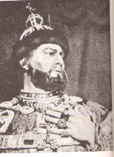 tenor Nicola rossi Lemeni